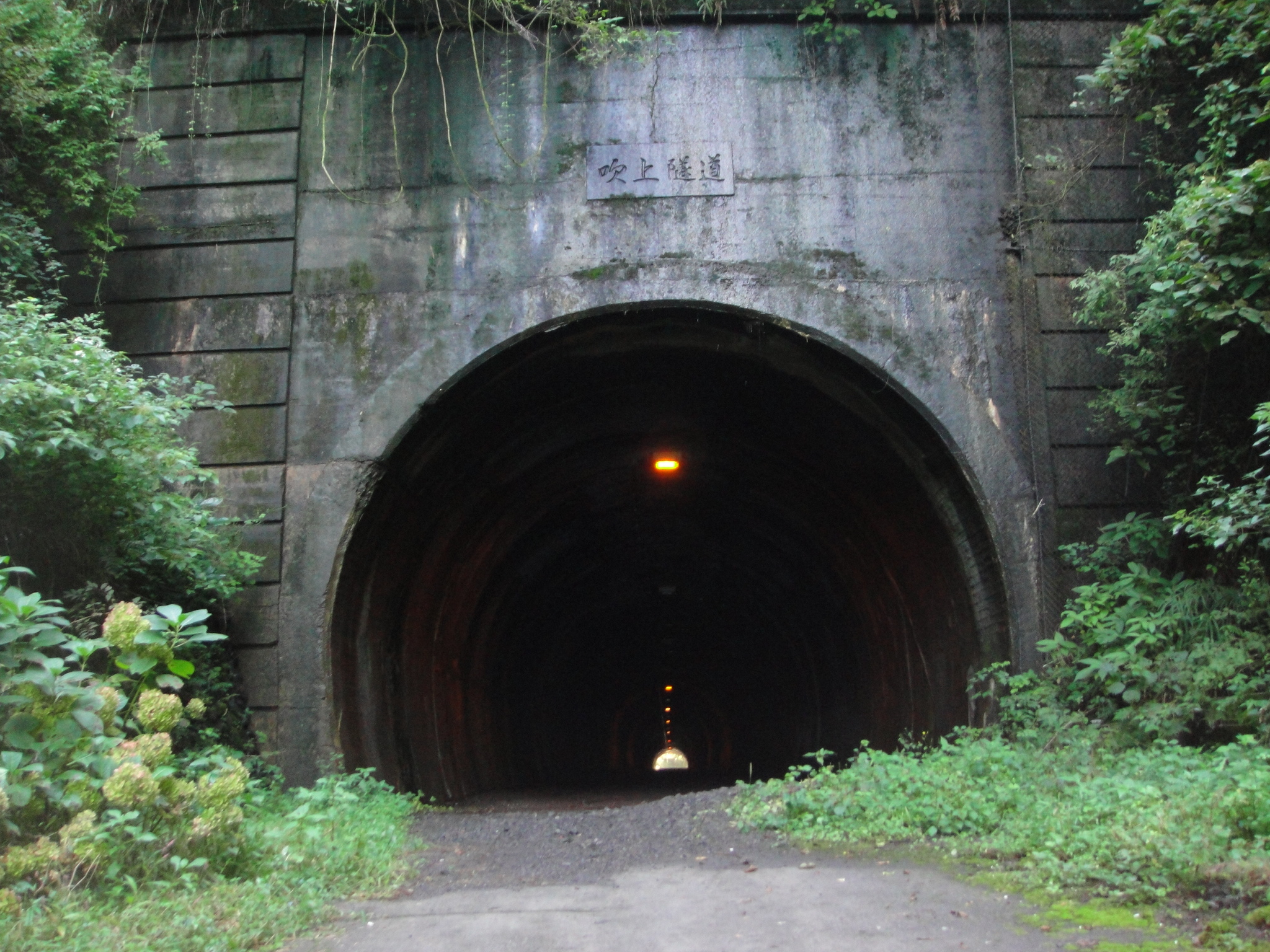 旧吹上トンネル 北側